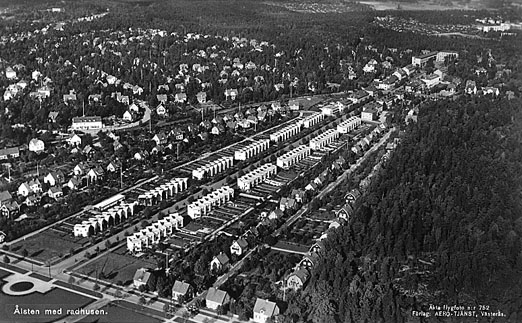 Ålsten med radhusen